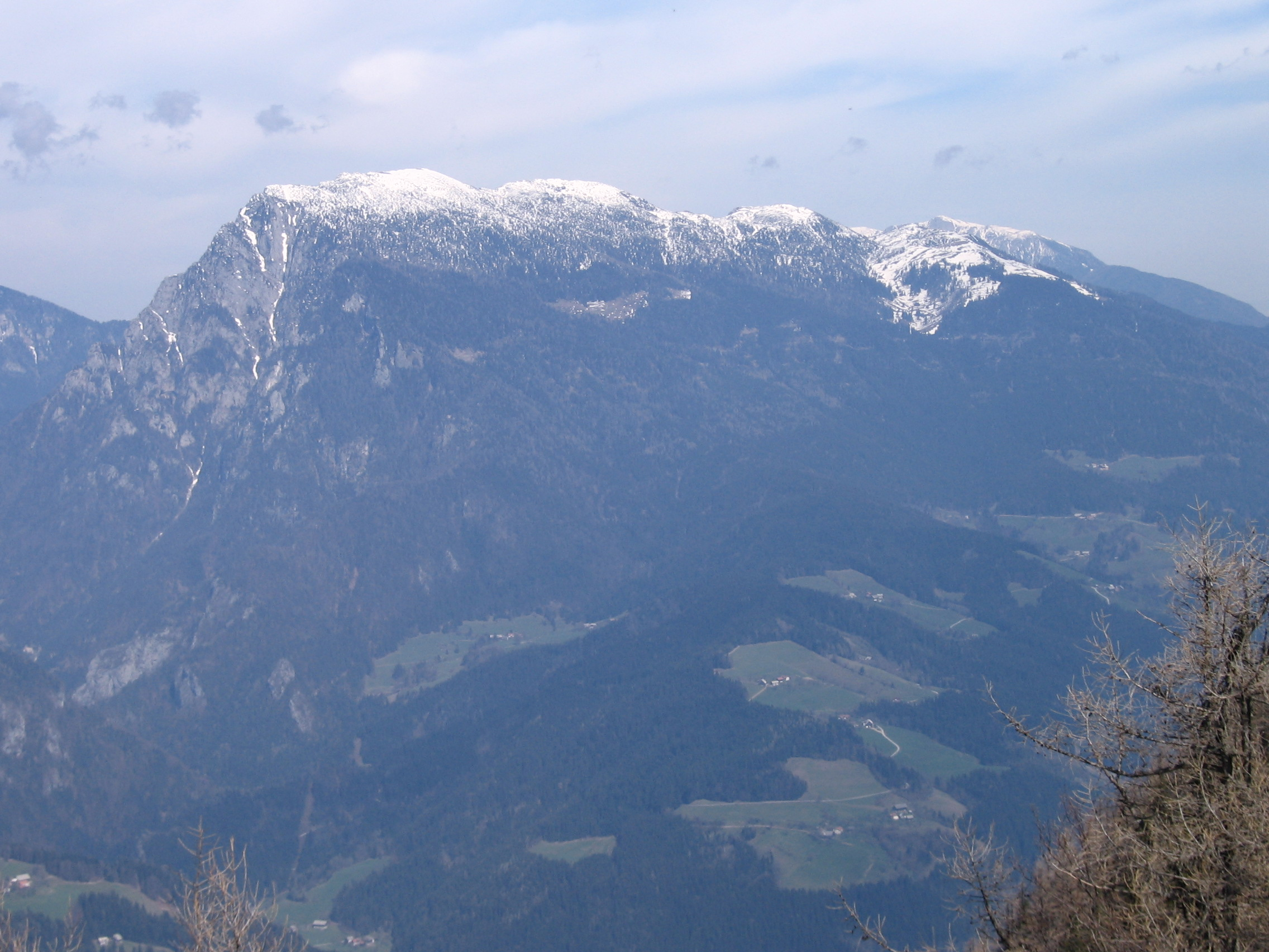 Mt. Raduha in Kamnik-Savinja Alps, Slovenia; from Veliki Rogatec